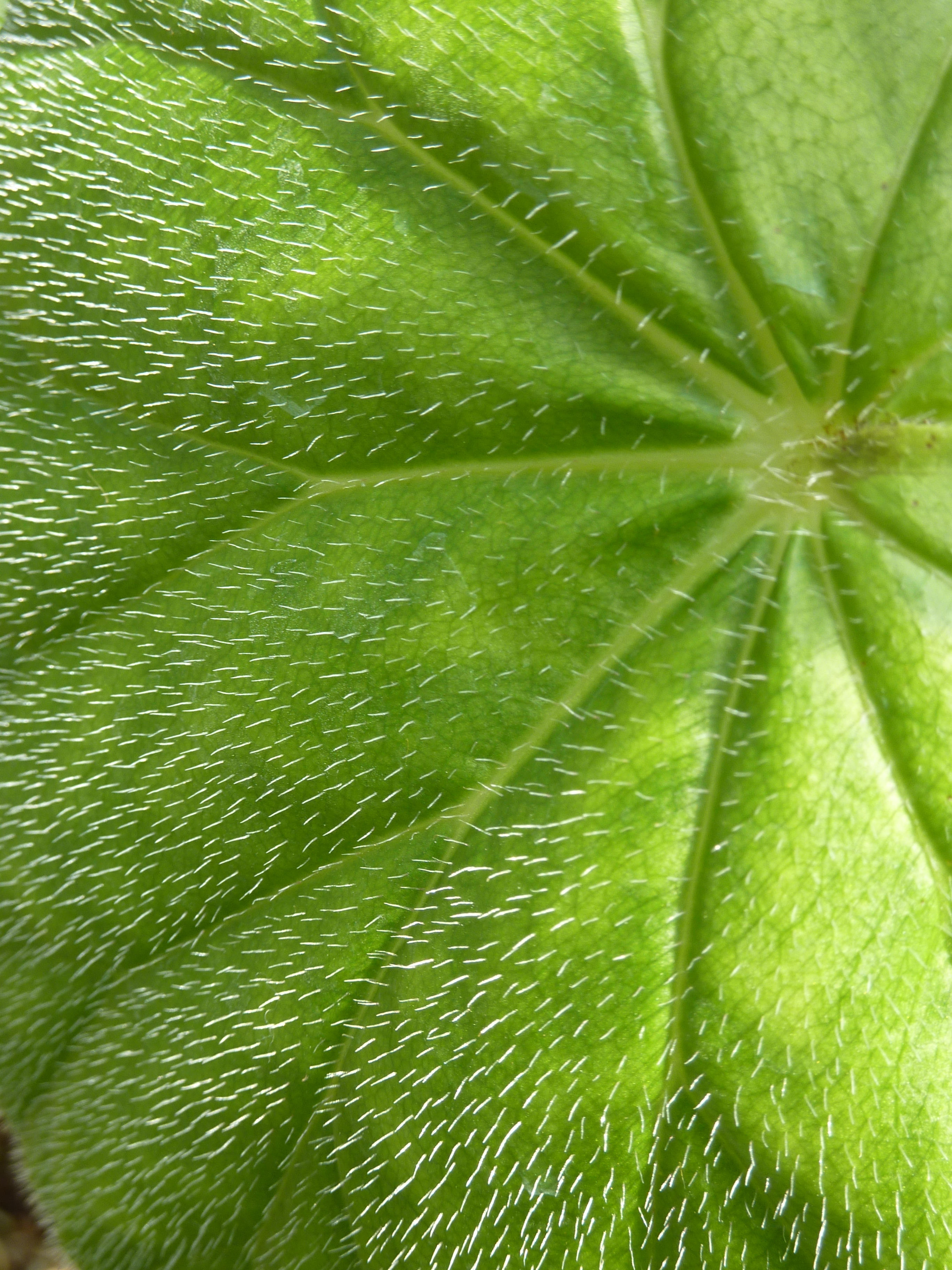 "Begonia karwinskyana", serres chaudes d'Auteuil - Jardin botanique de la Ville de Paris - France